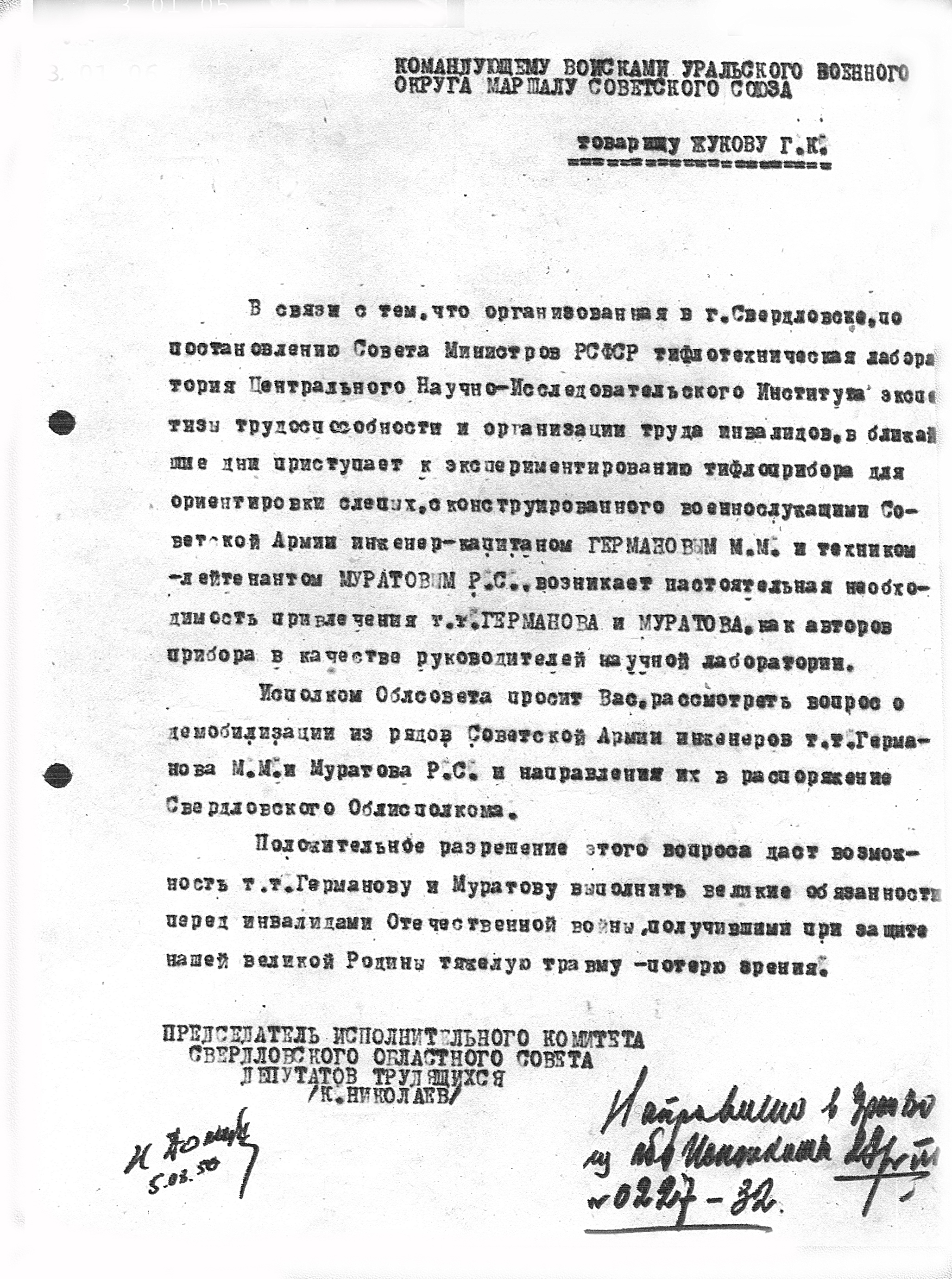 Официальный документ о лаборатории тифлотехники.